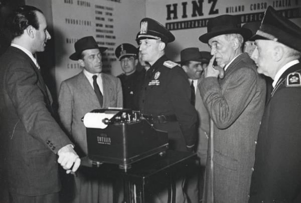 Carlo Ravasio, vicesegretario del Partito Nazionale Fascista, in visita alla Fiera di Milano accompagnato dal presidente della Fiera Piero Puricelli e da altre personalità.